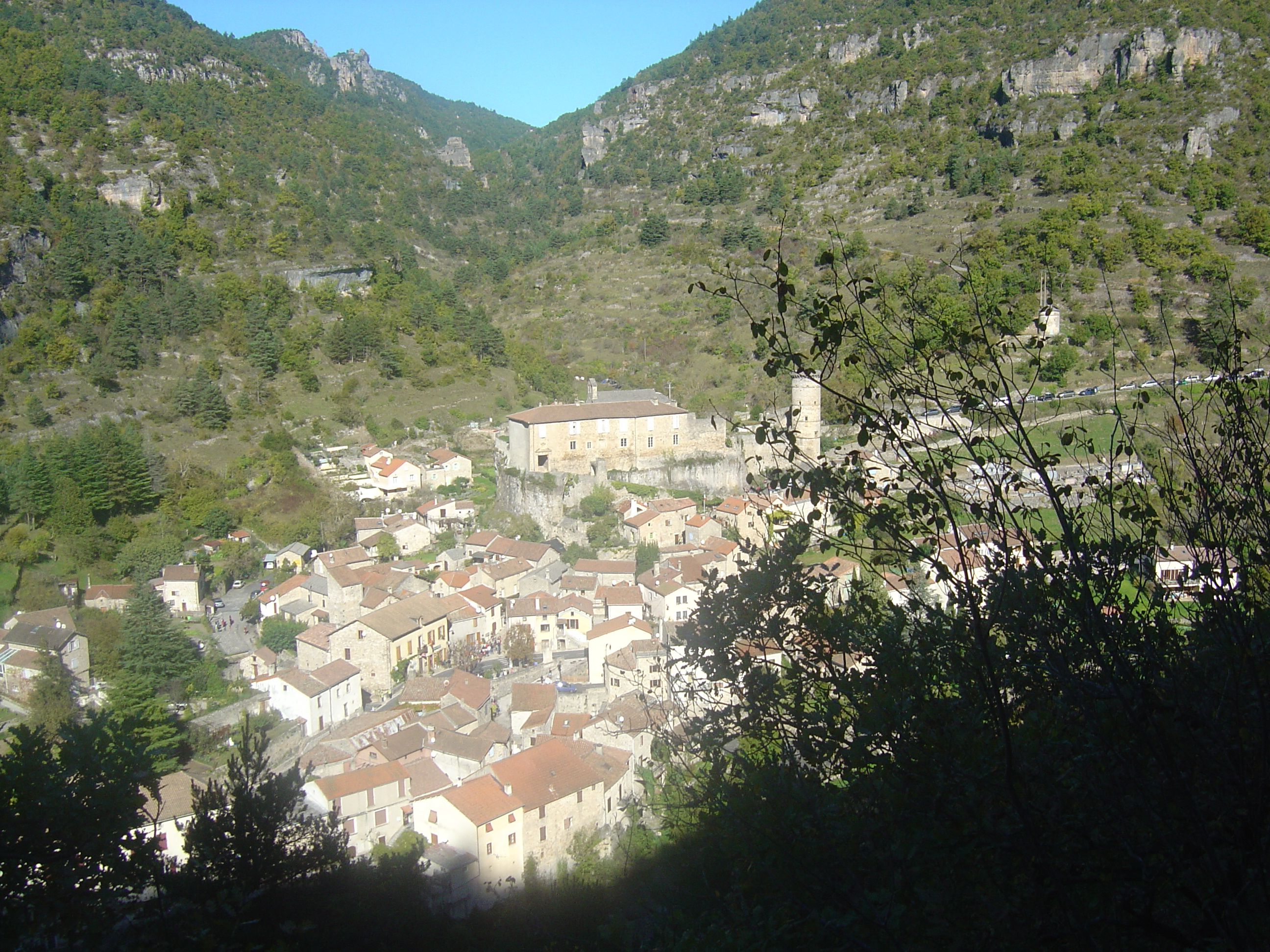 Vue sur le village de La Roque-Sainte-Marguerite depuis une ascension du grand trail des Templiers 2014